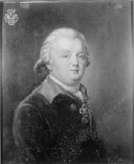 Georg Christoph von Lüdinghausen-Wolff (1751-1807), Politiker, 1797-1801 Kanzler, dann Landhofmeister der kurländischen Oberverwaltung